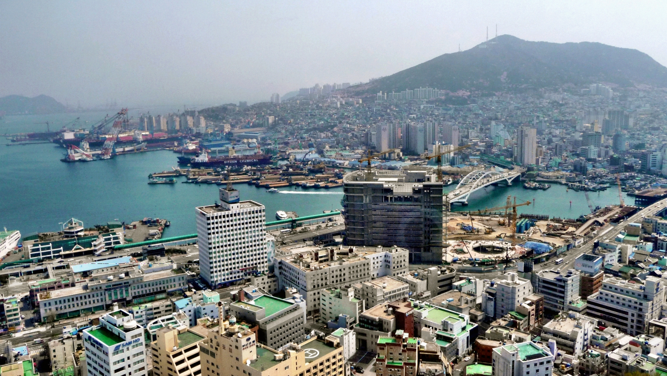 Busan Hafen mit Baustelle künftiger Lotto Tower